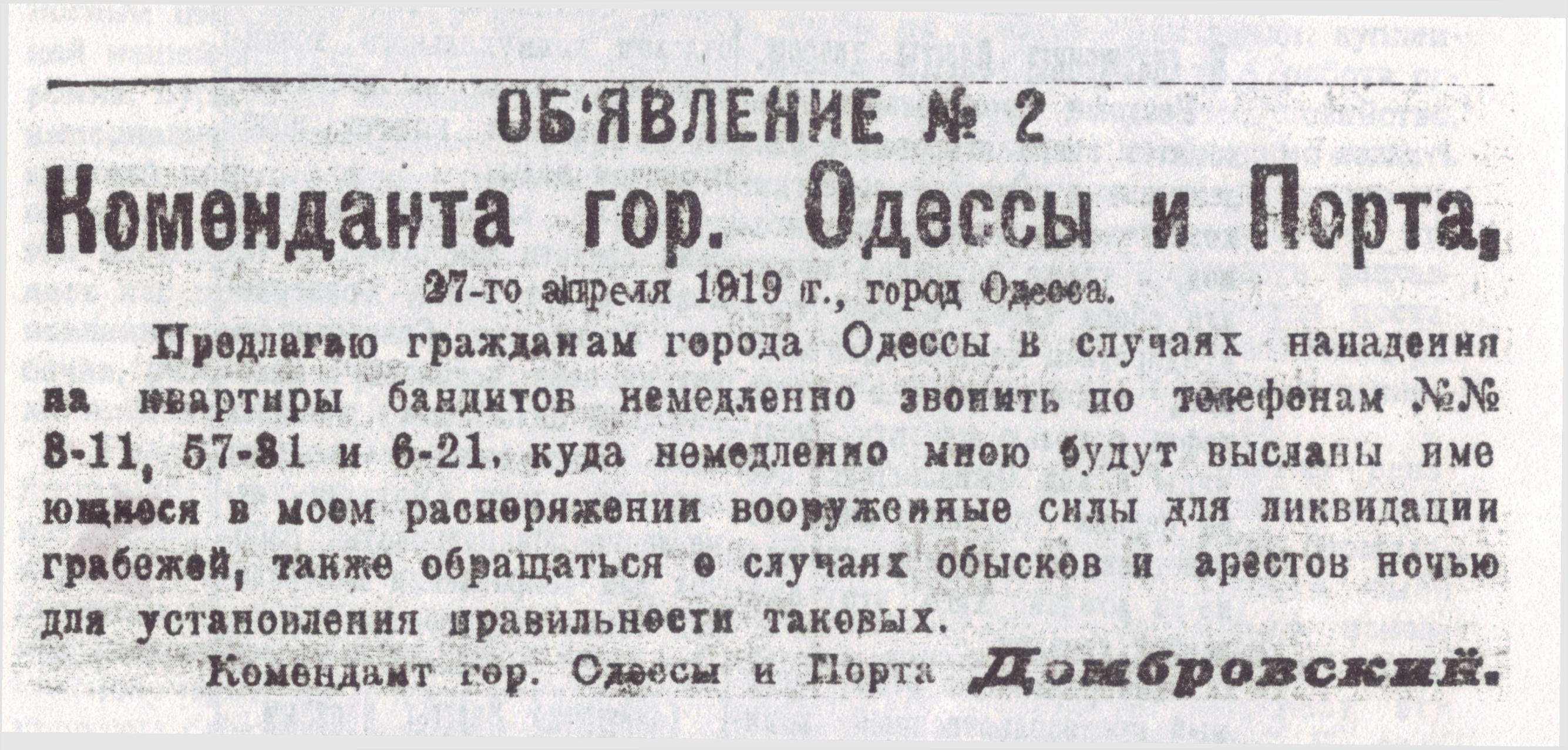 Объявление № 2 [красного] Коменданта гор. Одессы и Порта от 27 апреля 1919 г. (город был взят у французов 6 апреля). Предлагаю гражданам города Одессы в случае нападения на квартиры бандитов немедленно звонить...